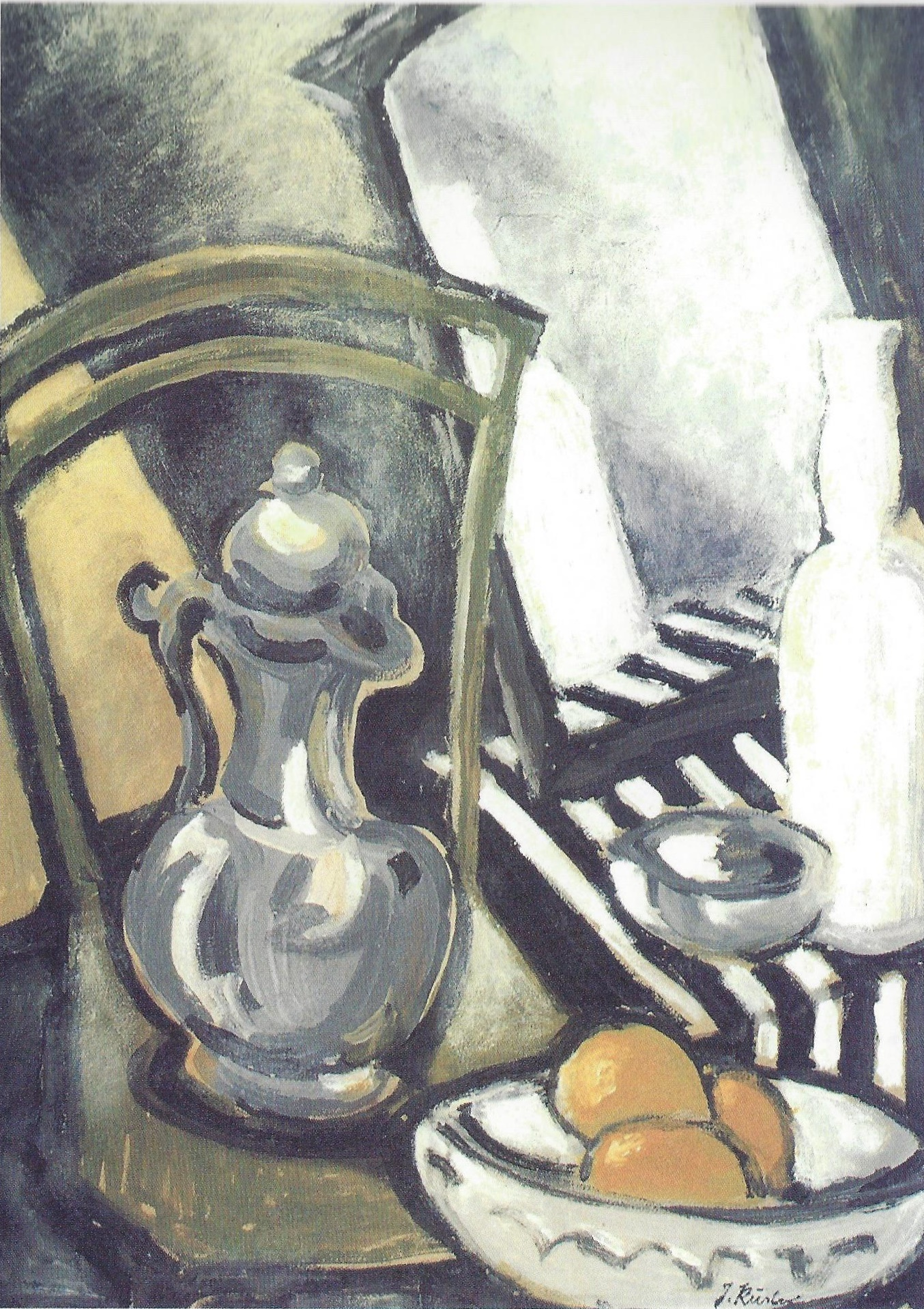 „Stilleben“, Eitempera